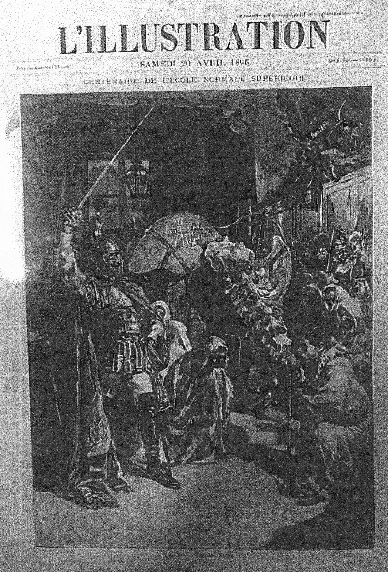 Une du journal "L'Illustration" le 20 avril 1895, consacrée au "Centenaire de l'Ecole normale supérieure". L'illustration de la une montre un rite de bizutage à l'Ecole normale supérieure de la rue d'Ulm à Paris : les élèves fraîchement admis au concours, dits "conscrits", vêtus en pèlerins à l'antique, se rendaient dans la bibliothèque où ils rendaient hommage à un squelette de megatherium qui s'y trouvait alors (il se trouve désormais dans les réserves du Muséum national d'histoire naturelle). Chaque nouvel élève devait se prosterner près du squelette et embrasser respectueusement le bout de sa queue. Sur la gauche, un élève normalien habillé en soldat antique grec ou romain lève son épée.